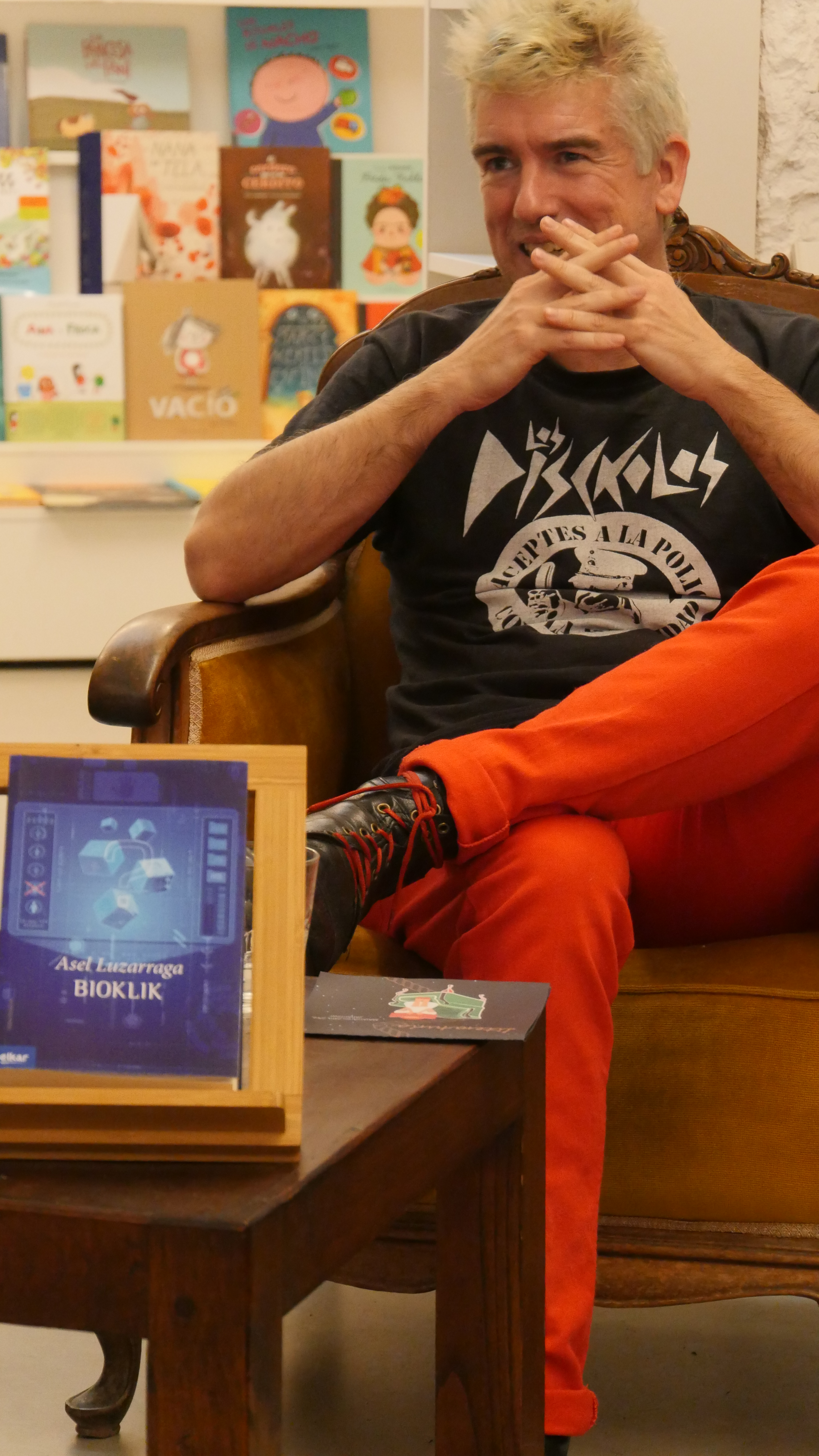 Asel Luzarraga idazlea Literaturia 2018n.